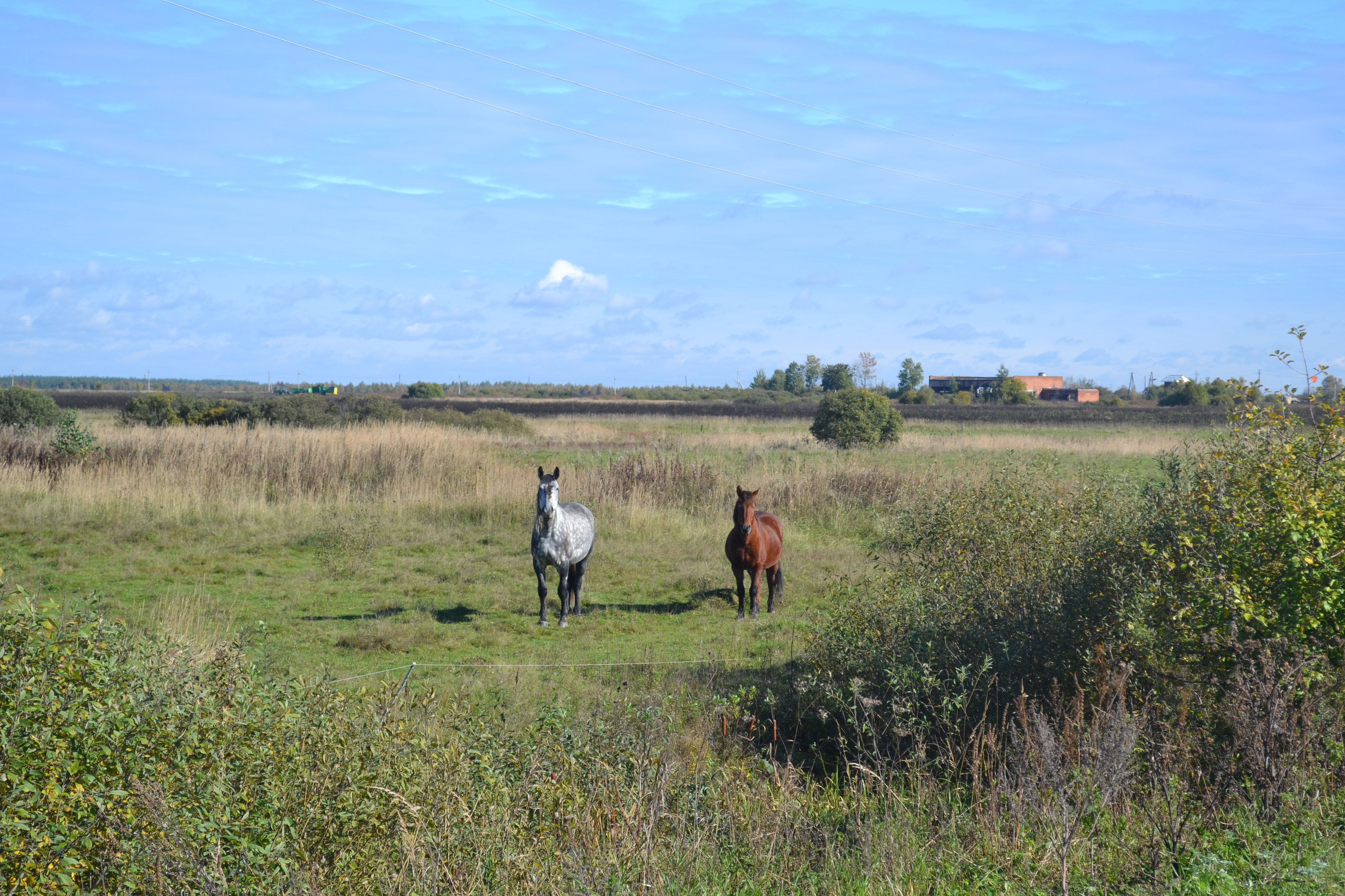 Лека (Шатурский район)